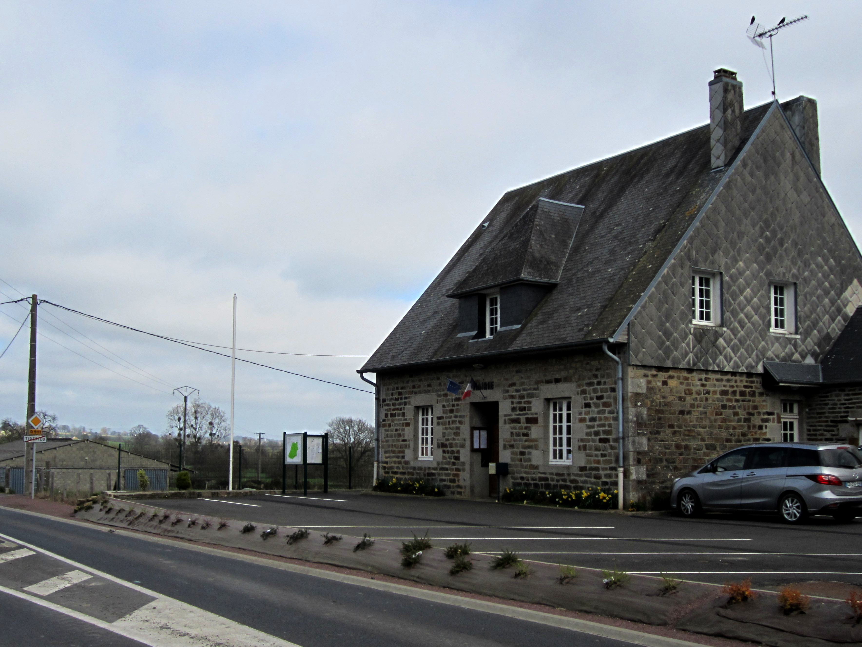 Tirepied, Manche